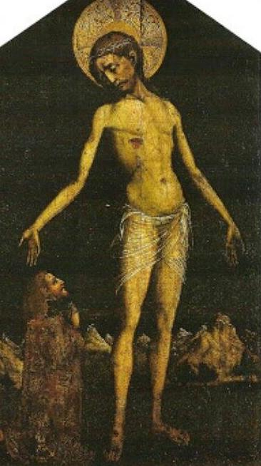 "Donator i Krist", portrait of King Stjepan Tomašević, 1461 Authorship: Lovro Dobričević, 1461. (mnogi ovo djelo pripisuju Jacopu Belliniju što je netačno). Technique: distemper and gilding on board. Donor: Josip Juraj Strossmayer, 1883. (Na poleđini je bila nalijepljena povelja s prikazom genealoškog stabla bosanskih i srpskih kraljeva te grbovima ilirskih zemalja s nadodanim grbom obitelji Ohmučević.) "Стјепан Томашевић, посљедњи краљ босански, клечи пред Спаситељем", 1461 ("Повјест Хрвата од најстаријих времена до свршетка XIX стољећа", 37) Autor: Jacopo Bellini, 1461. ("Gotico in Slovenia", 56).